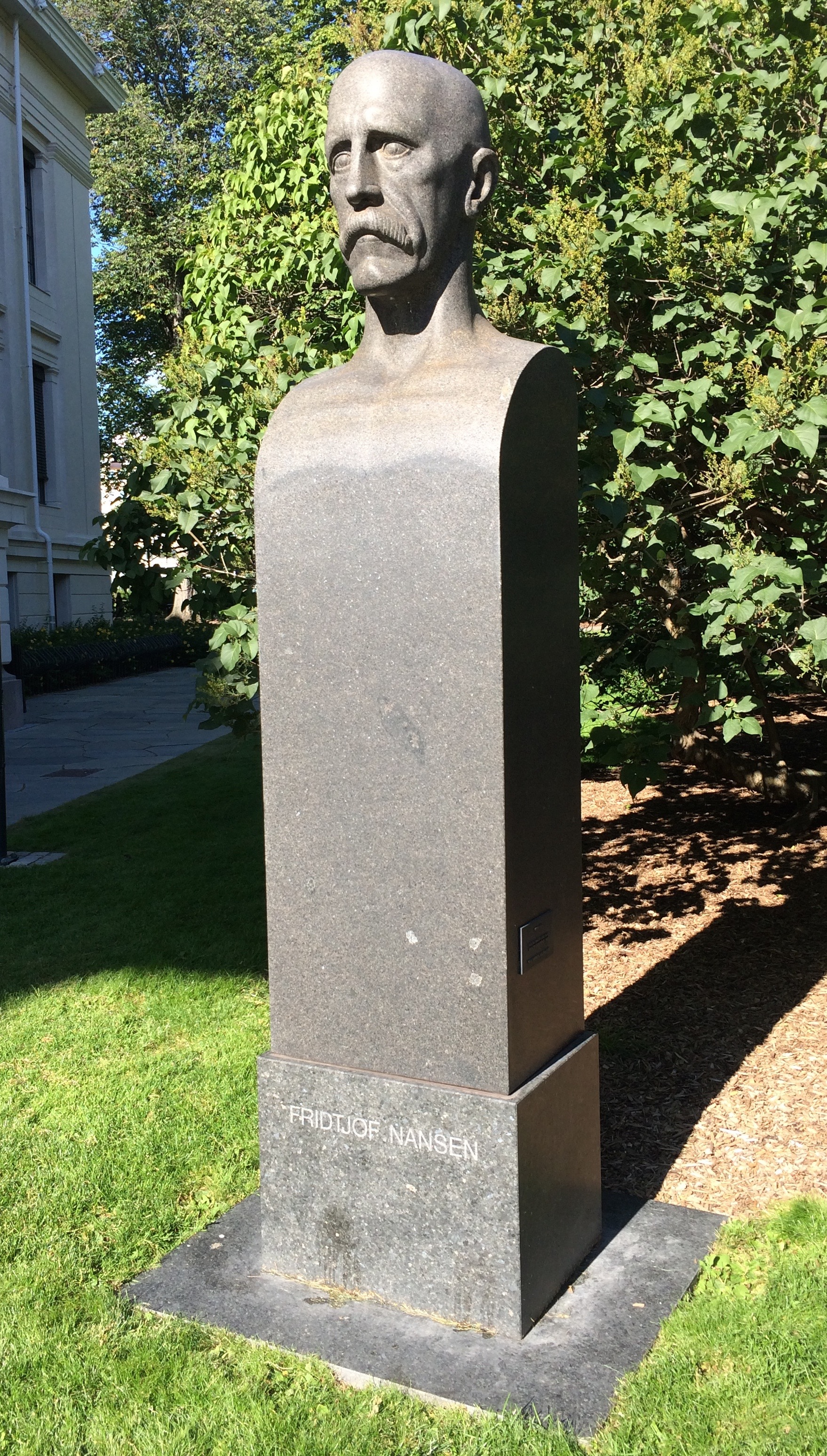 Kai Nielsens byste/herme av Fridtjof Nansen i Universitetshagen i Oslo sentrum. I 1921 ga den danske billedhoggeren Kai Nielsen Nansenbysten til Oslo kommune. Bysten sto i Universitetshagen 1922-1949, deretter på Konprinsesse Märthas plass ved rådhuset i byen. I 2011 ble bysten flyttet tilbake til Universitetshagen, på et annet sted enn den opprinnelig ble plassert. Fridtjof Nansen var ansatt som professor ved Universitetet i Oslo og ble mange hyllet på Universitetsplassen. Avdukning av Nansenbyste 2011 Nansen-byste på plass